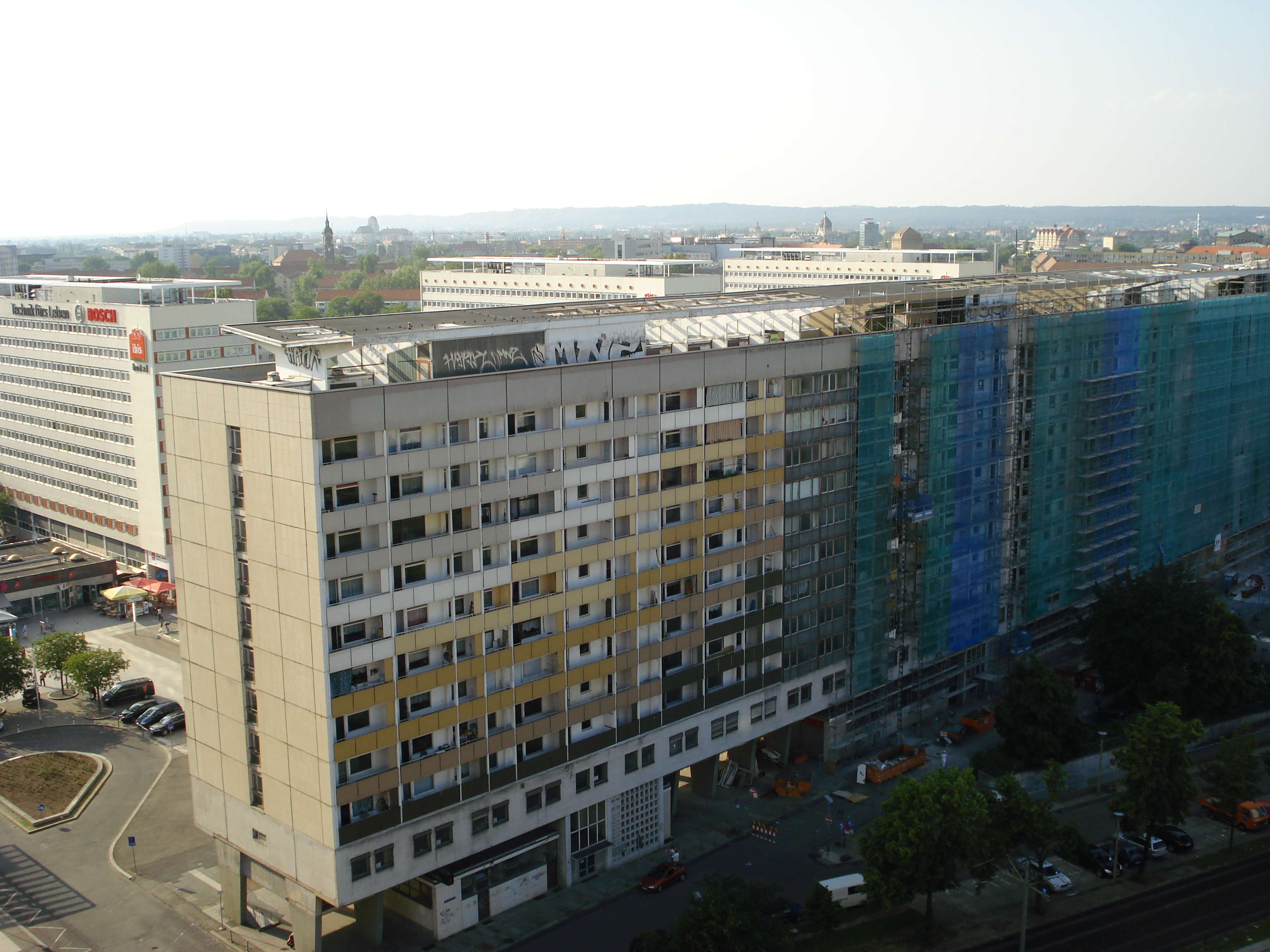 "Prager Zeile" während der Sanierung, mit 240 Metern der längste Plattenbau in Dresden